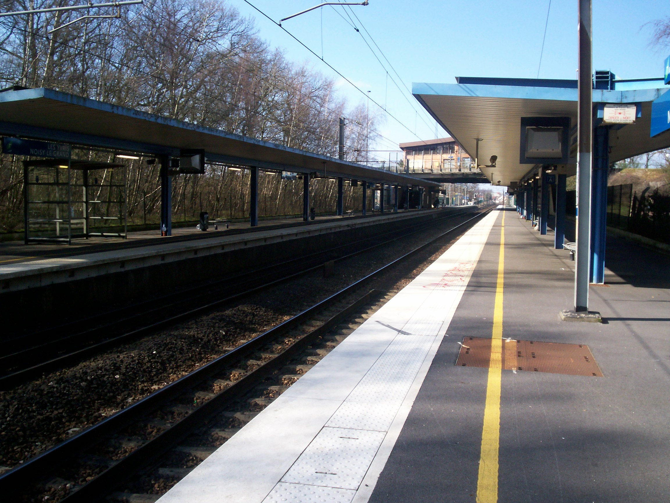 RER E - Gare des Yvris - Noisy-le-Grand